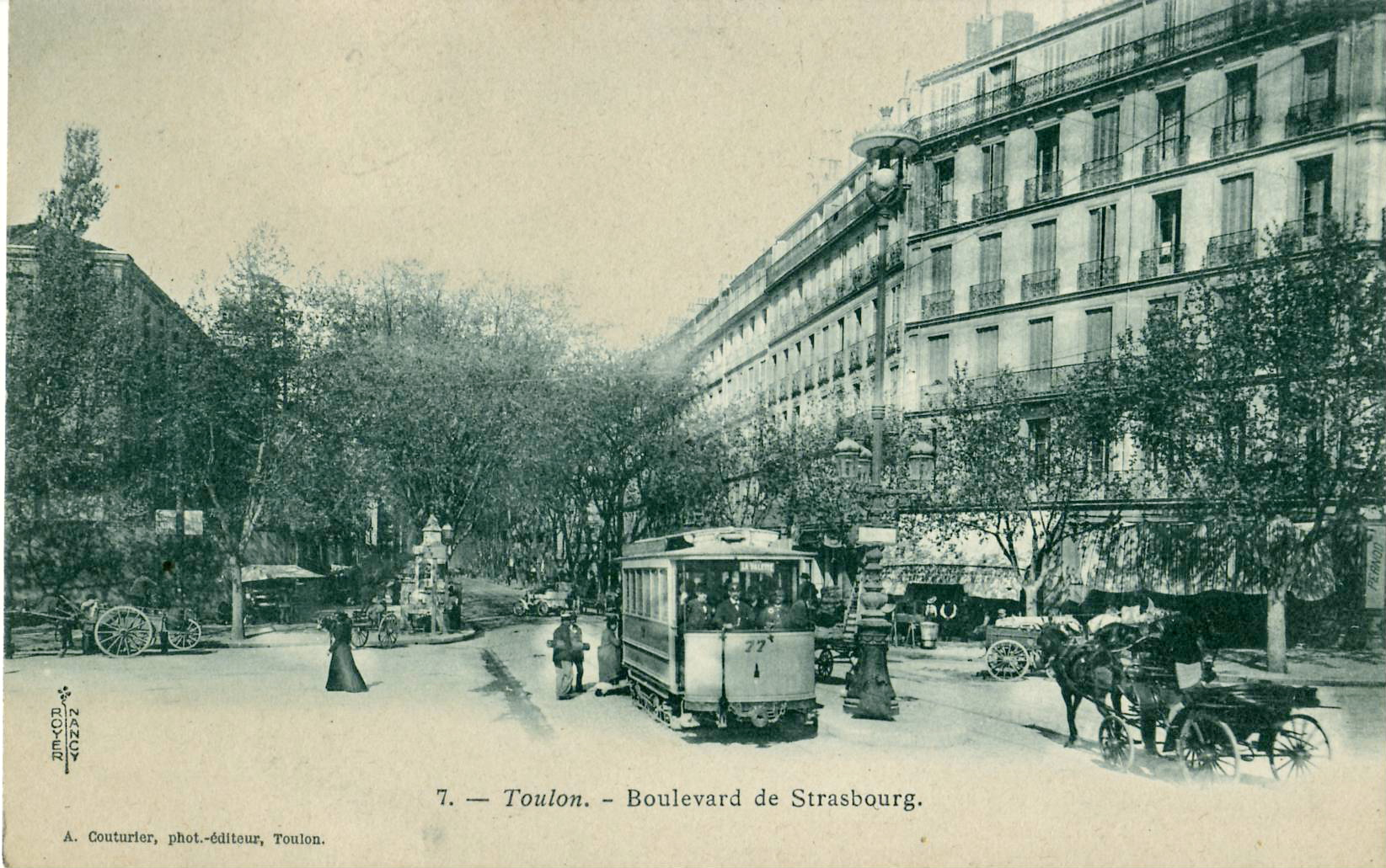 Carte postale ancienne éditée par A. Couturier à Toulon (imprimé par Royer à Nancy), n°7 : TOULON - Boulevard de Strasbourg